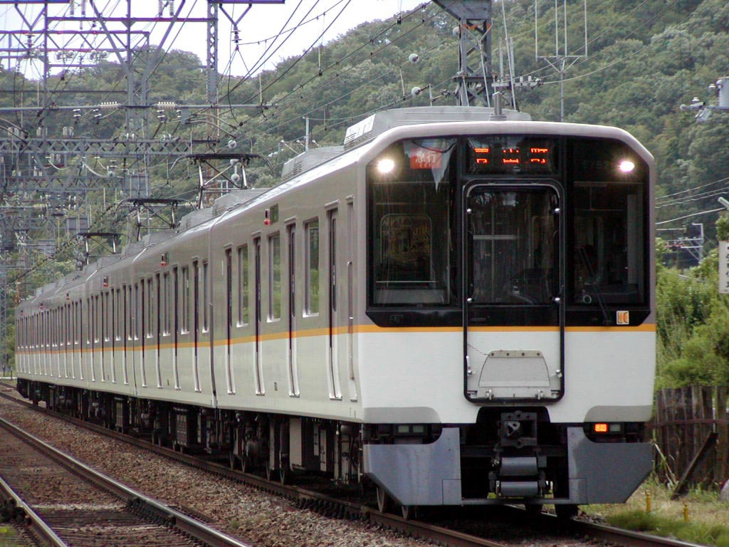 近鉄5820系50番代